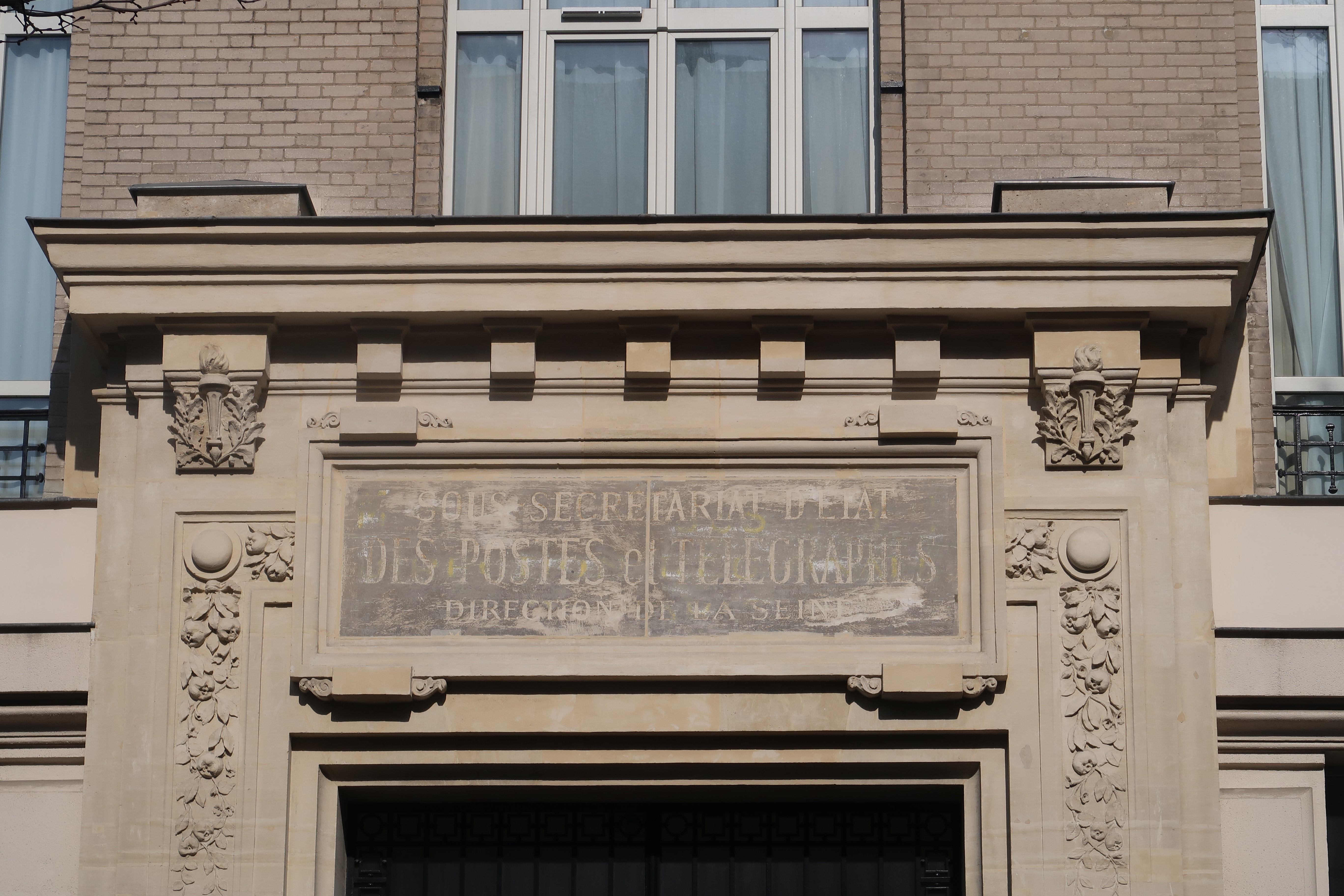 Détail de l'enseigne du 93 boulevard du Montparnasse (Paris, 6e).